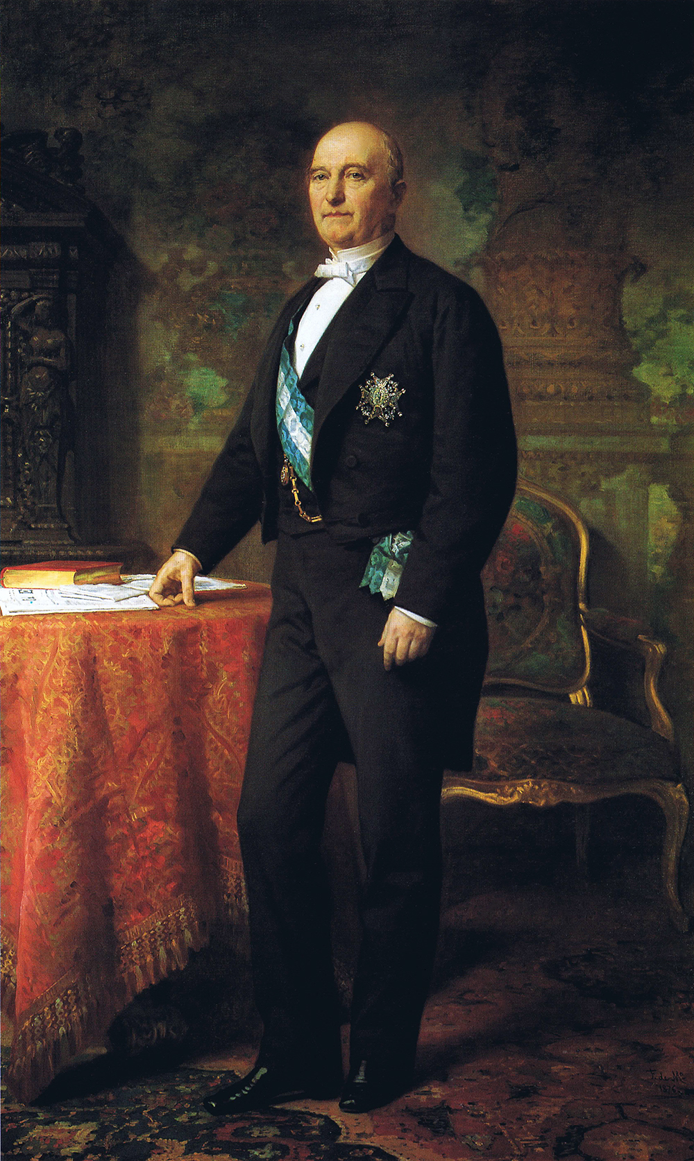 Retrato del financiero y aristócrata español Juan Manuel de Manzanedo (1803-1882), que fue el primer marqués de Manzanedo y el primer duque de Santoña.